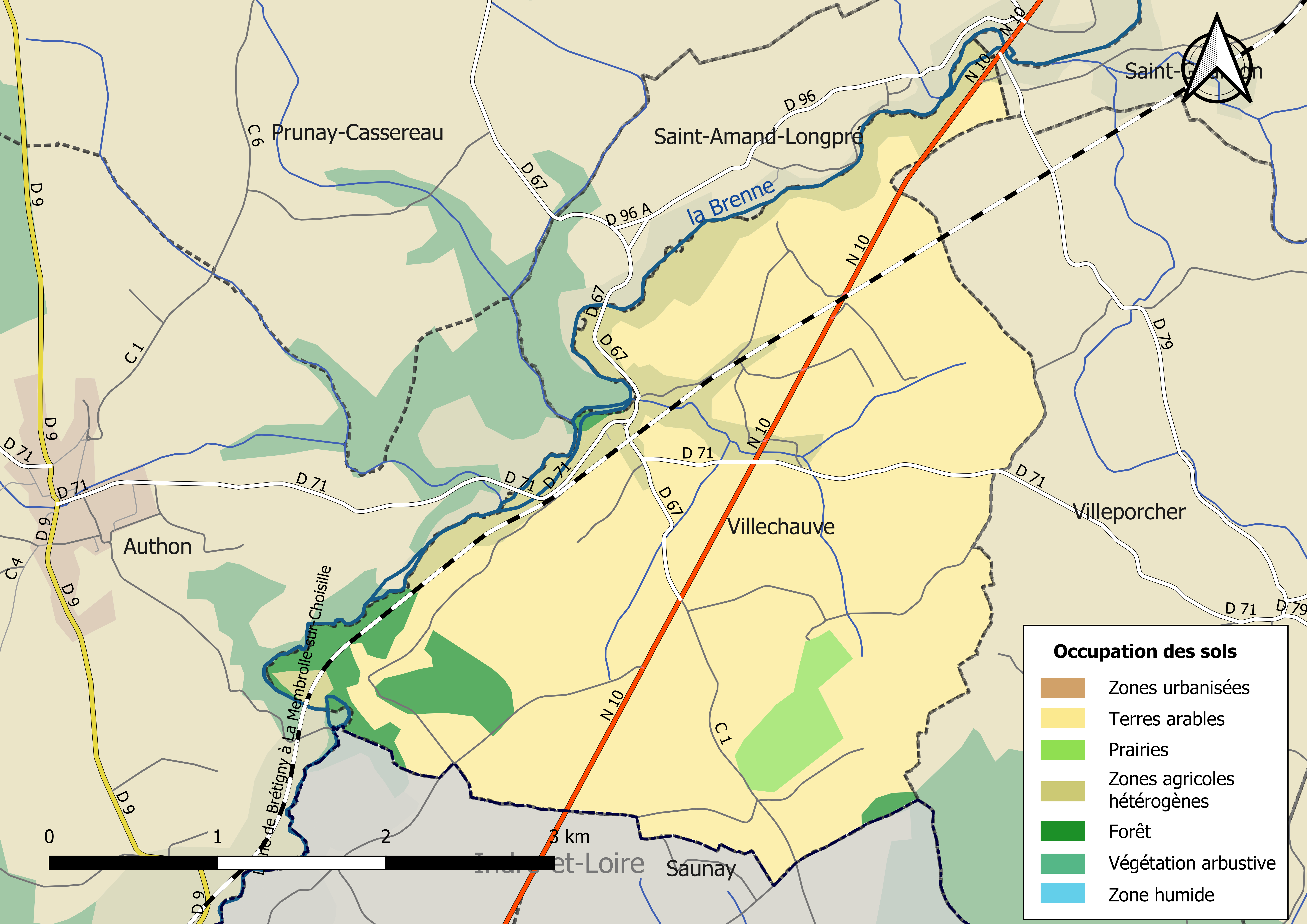 Carte des infrastructures et de l’occupation des sols en 2018 de la commune de Villechauve (France).